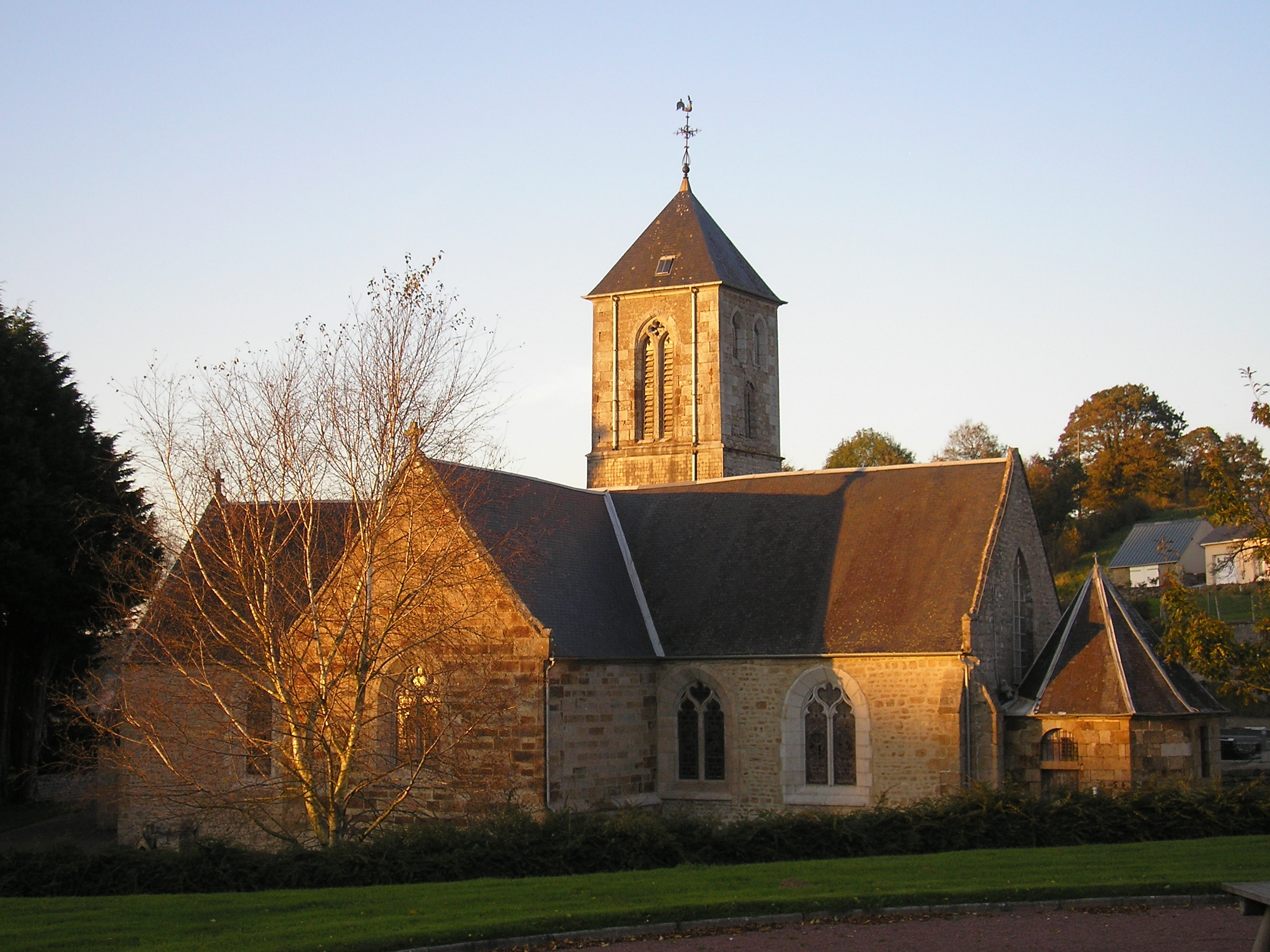 Saint-Manvieu-Bocage (Normandie, France). L'église Saint-Pierre.